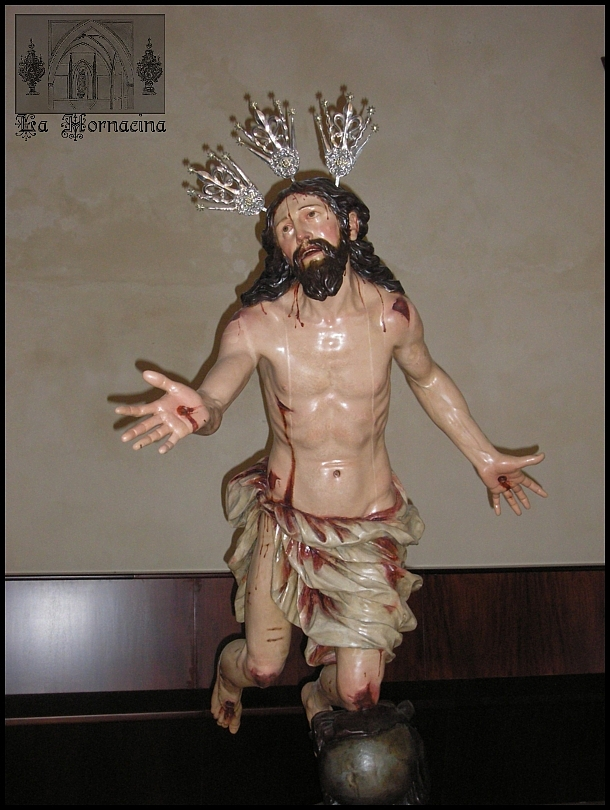 Cristo del Perdón de Pedro Roldán que se encuentra en la Iglesia Parroquial Santa María La Mayor La Coronada.